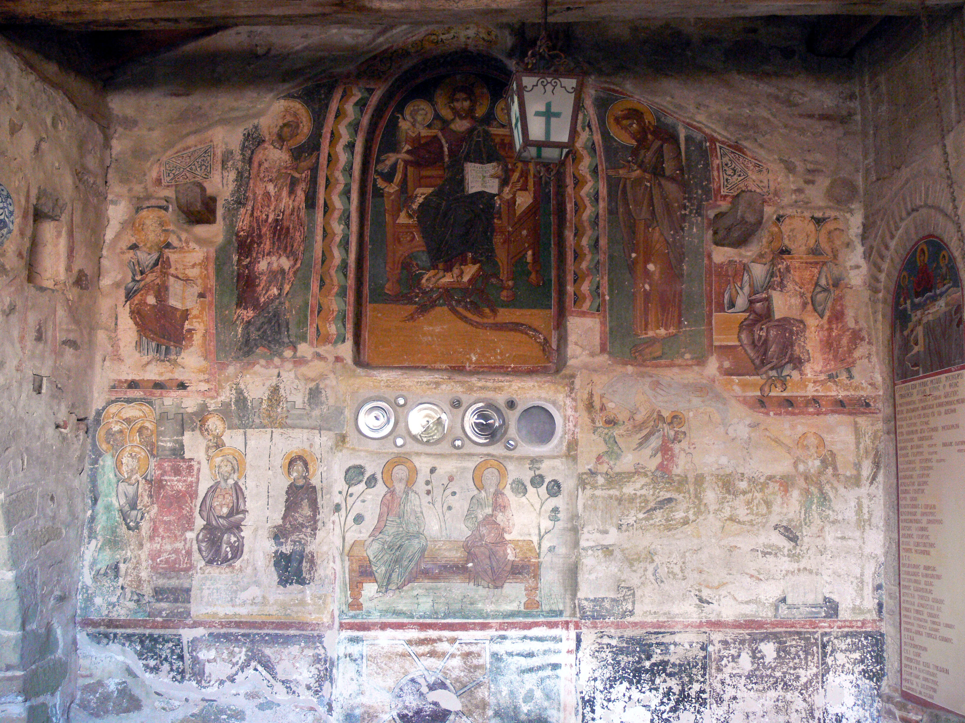 Meteora: Fresko im Kloster der Verklärung Christi